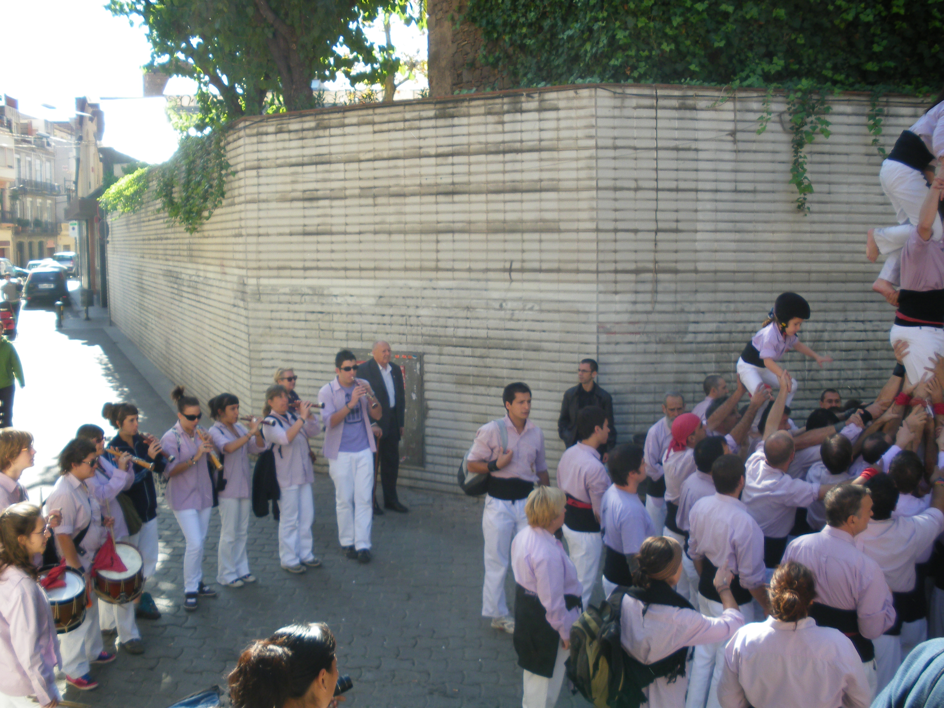 Grallers dels Minyons de Terrassa tocant el Toc d'entrar a plaça, a la diada dels Castellers de Sants, 2009